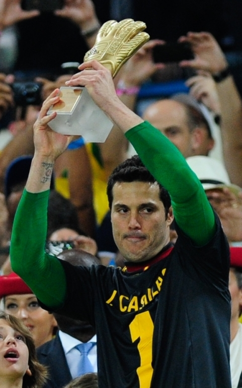 No Estádio do Maracanã, Brasil e Espanha disputam a taça da Copa das Confederações de 2013.